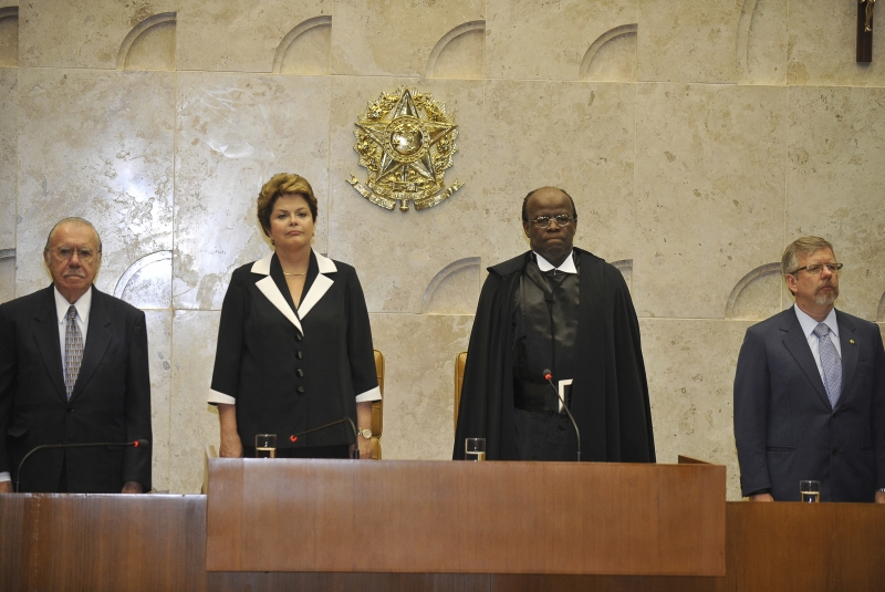 José Sarney, Dilma Rousseff e Marco Maia durante a posse de Joaquim Barbosa como presidente do Supremo Tribunal Federal (STF).